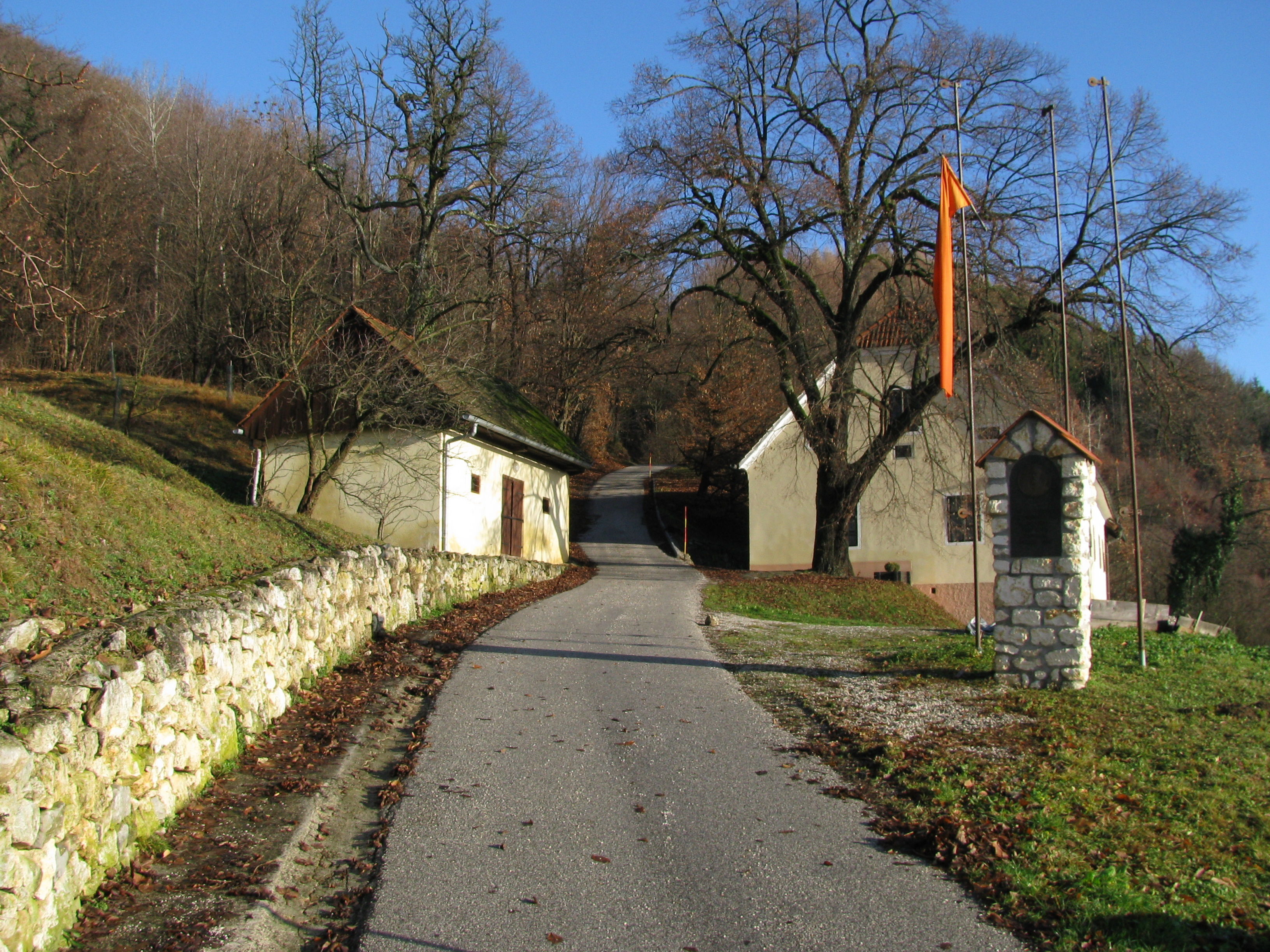 Rojstna hiša Maksa Pleteršnika